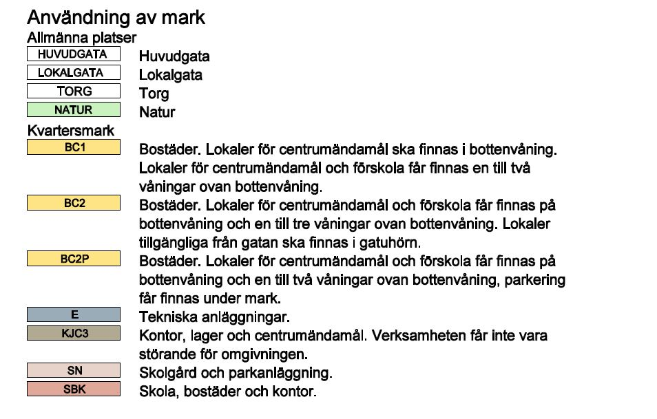 Detaljplan (Dp 2010-21655) för del av fastigheten Sjövik 5, Liljeholmen (utsnitt).